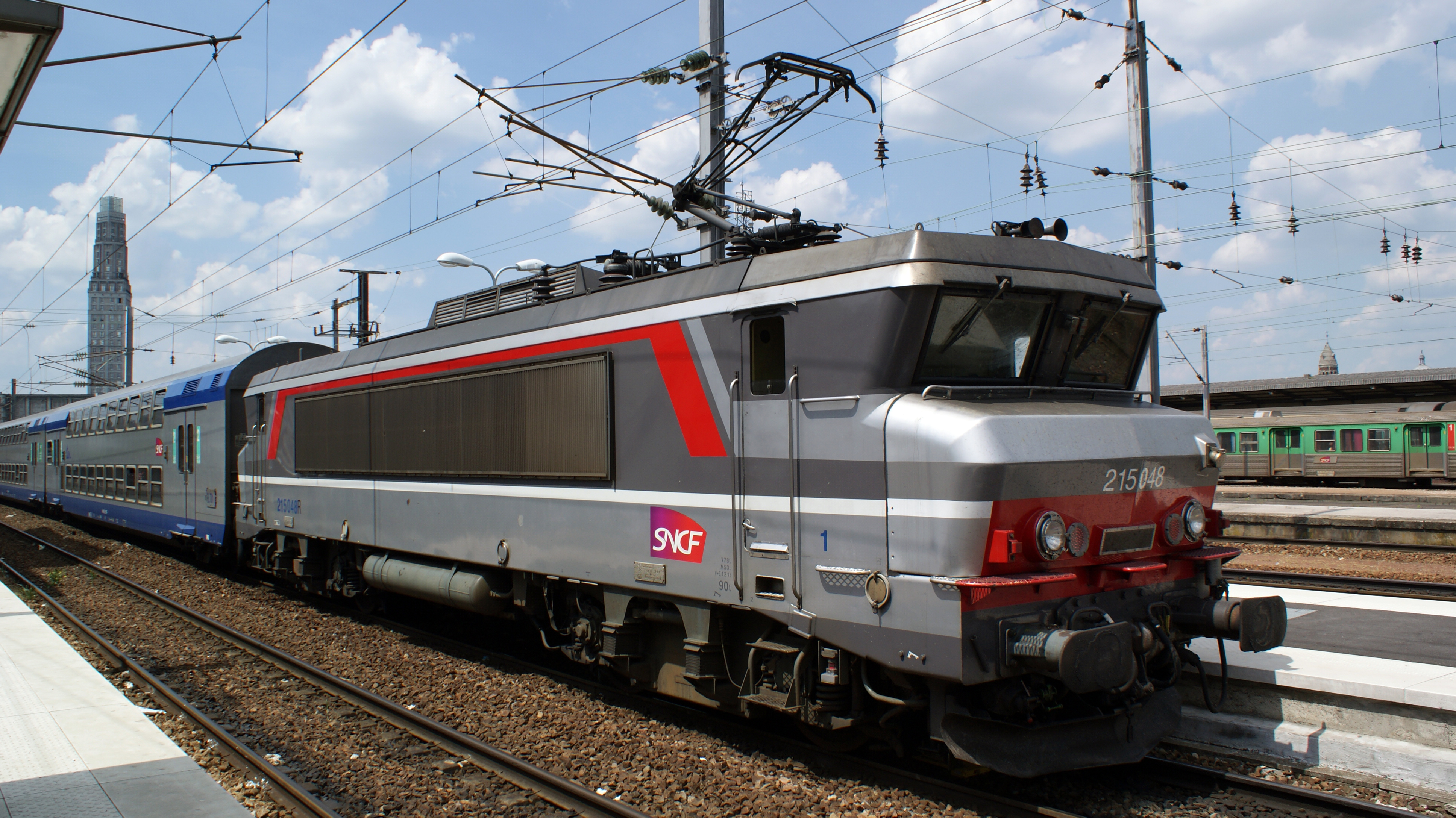 BB 15048 en attente à Amiens